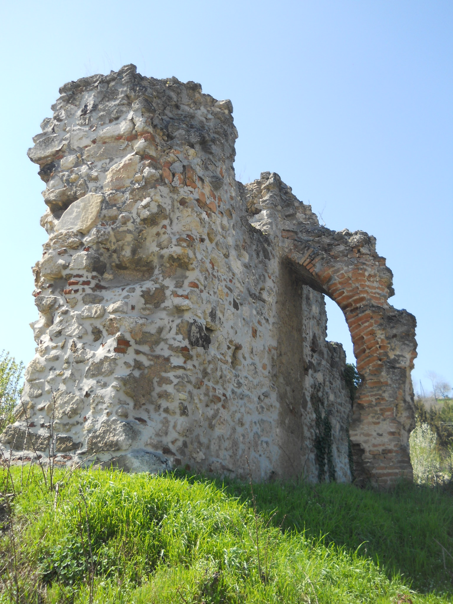 Szalánkemén/Stari Slankamen - romok a faluba ereszkedő út kanyarjában